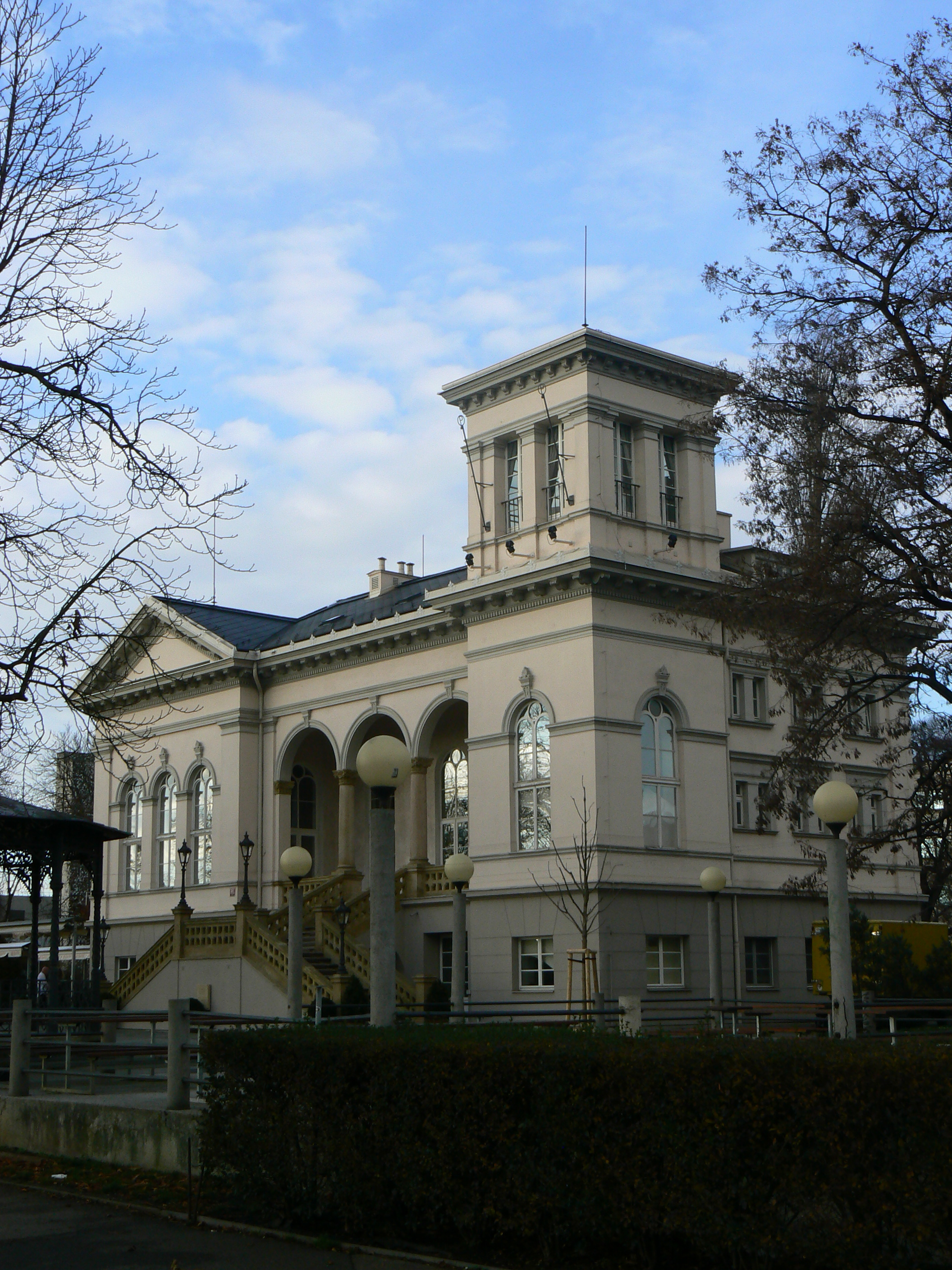 Letenský zámeček